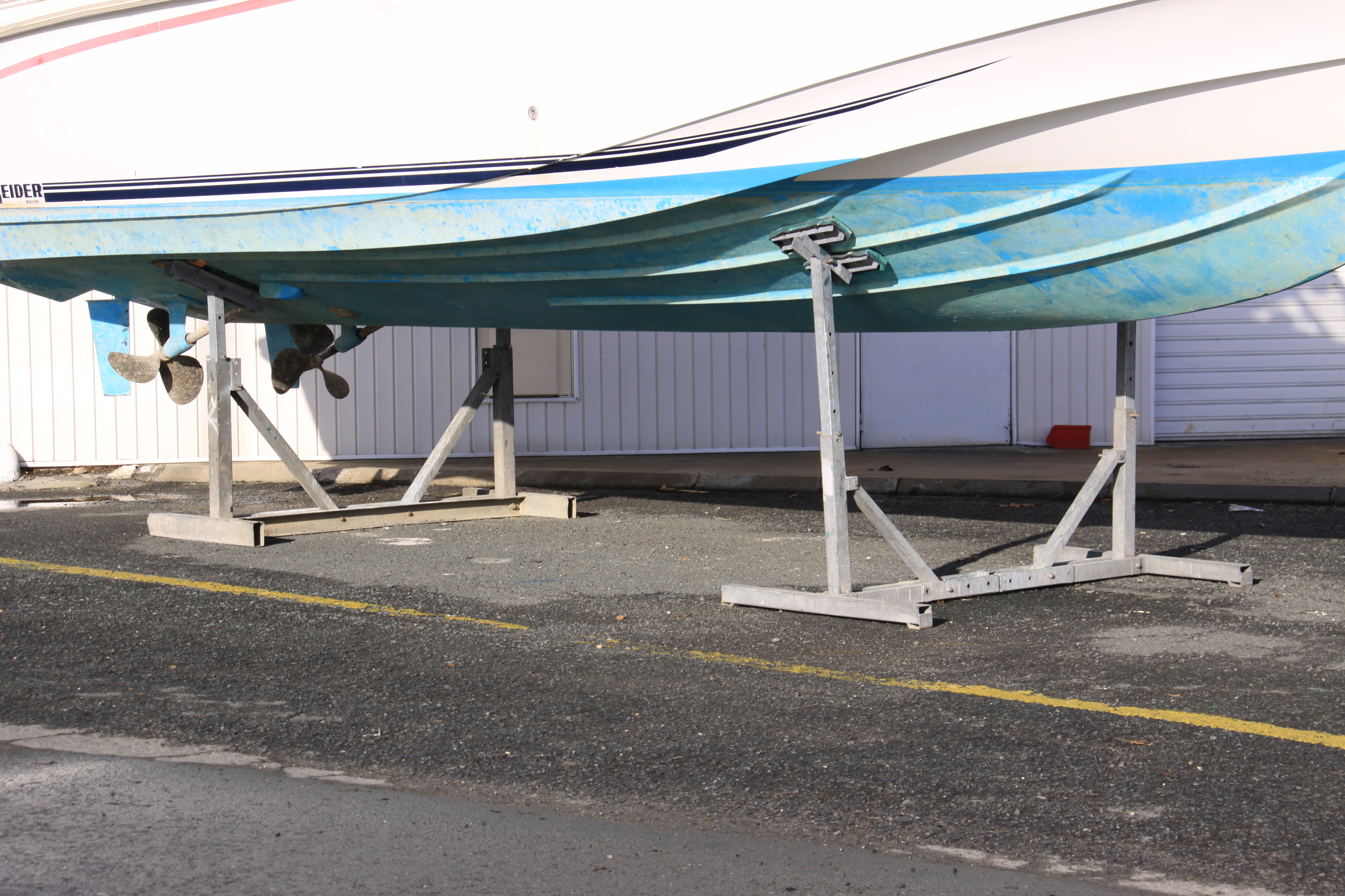 Deux bers indépendants fixes soutenant une vedette à moteur. La Rochelle (Port de Plaisance des Minimes), Charente Maritime, France.